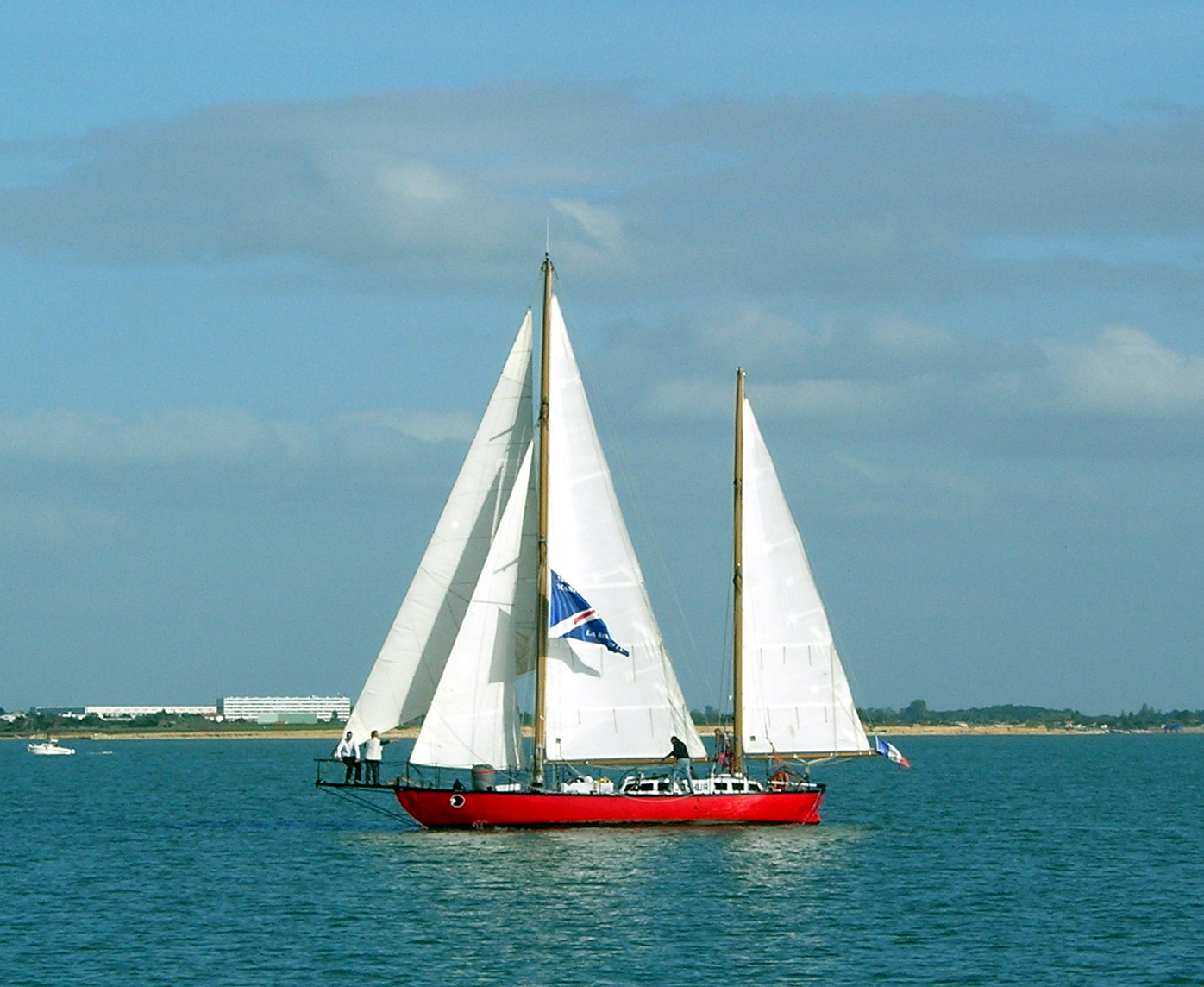 Joshua, le bateau de Moitessier aux Minimes à La Rochelle